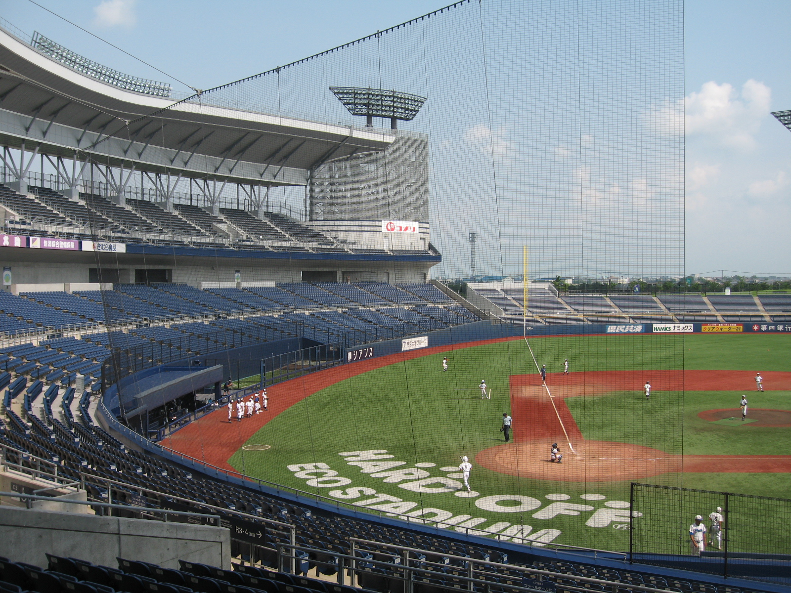 新潟県立野球場の観客席とグラウンド。